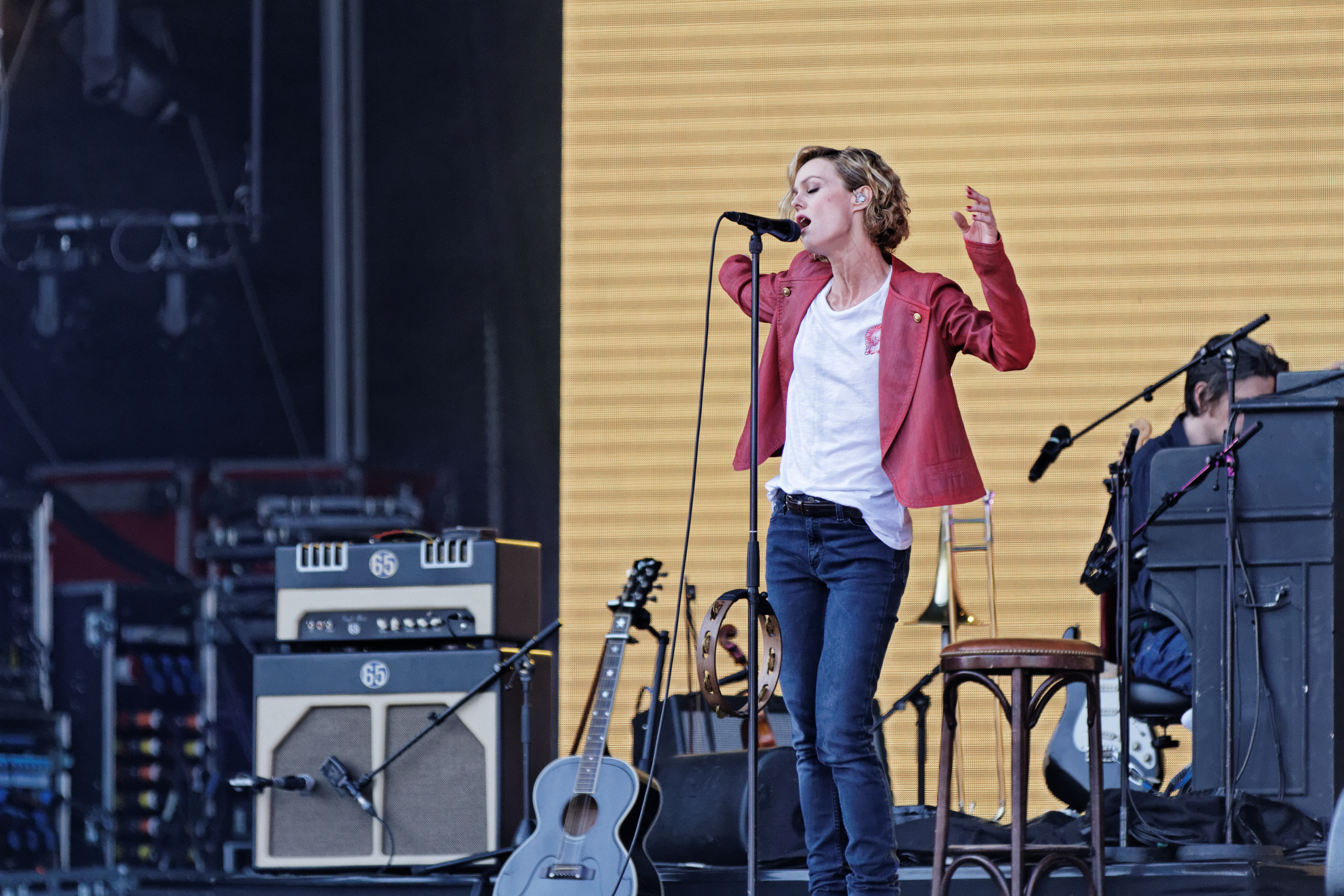 Vanessa Paradis en concert sur la scène Glenmor lors du festival des Vieilles Charrues 2014.